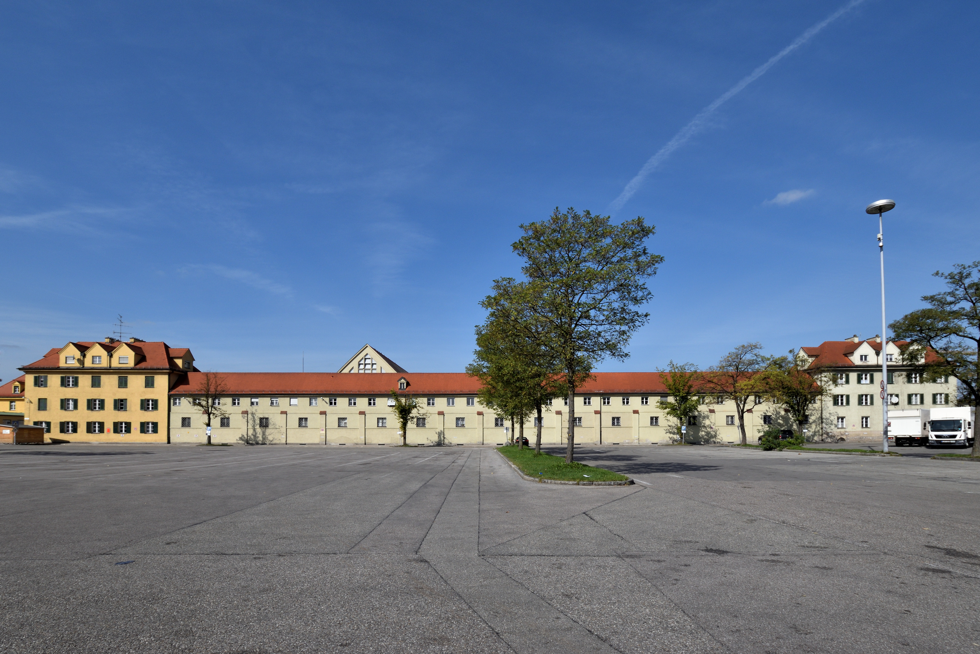 München - Großmarkthalle - Ladenreihe von Osten - September 2018This is a photograph of an architectural monument.